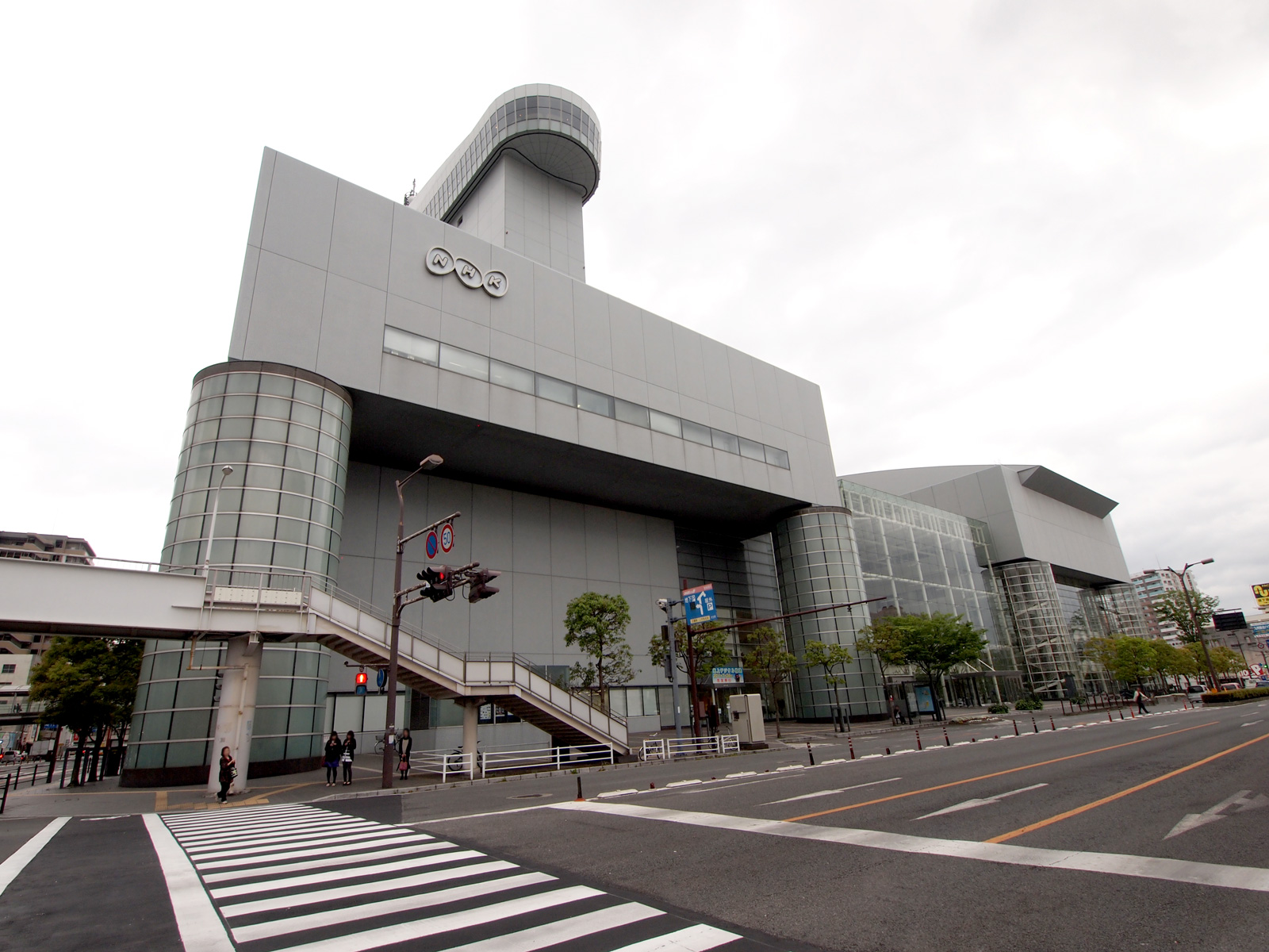 NHK大分放送局（大分県大分市）